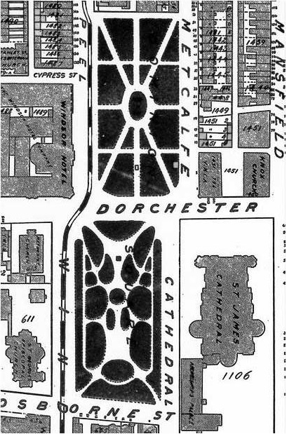 Plan historique, Détail de l’atlas Pinsonneault, Archives nationales du Canada, Ottawa, NMC-16305, 1907